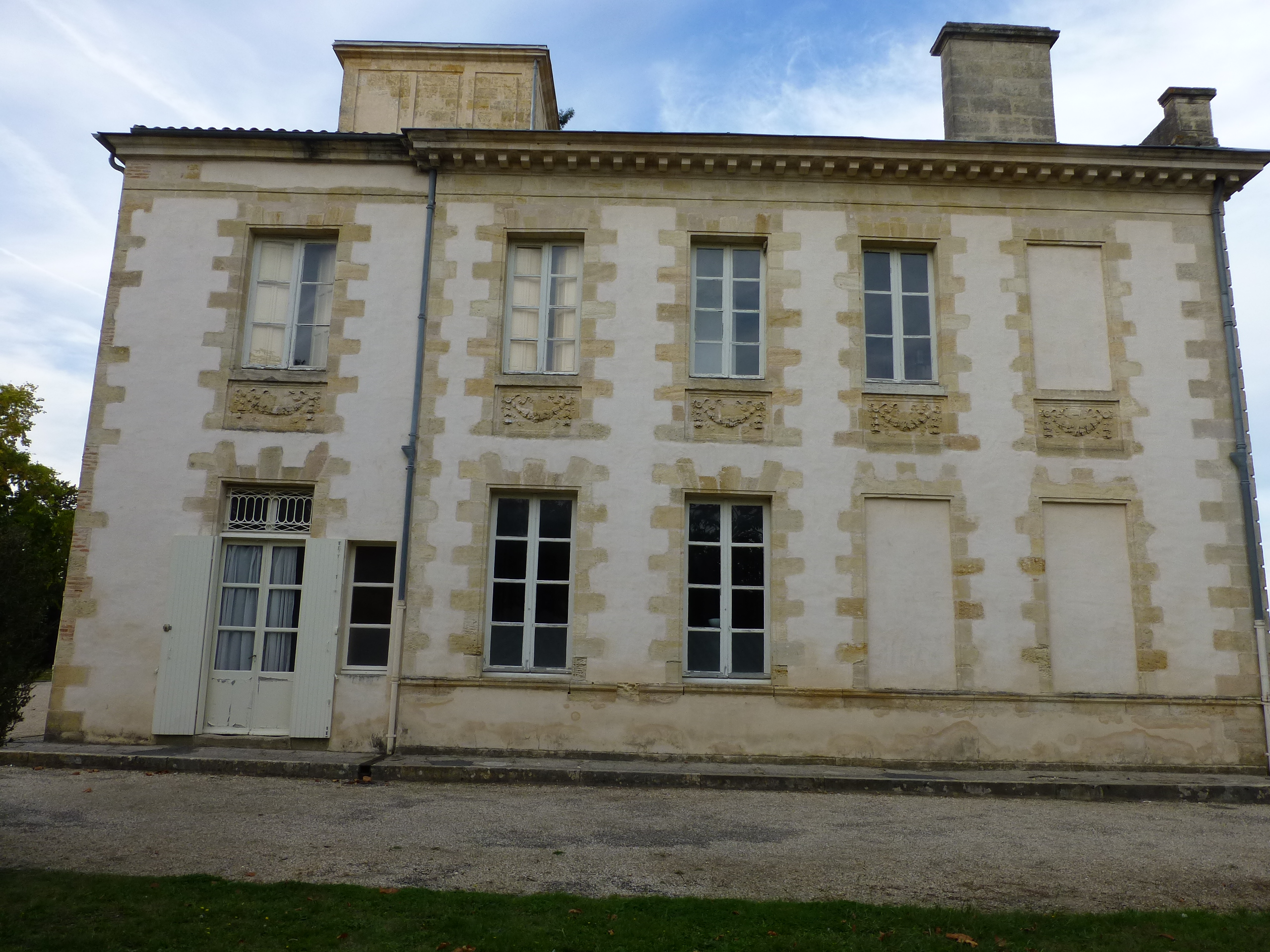 Gradignan, Château de Moulerens, façade sud.